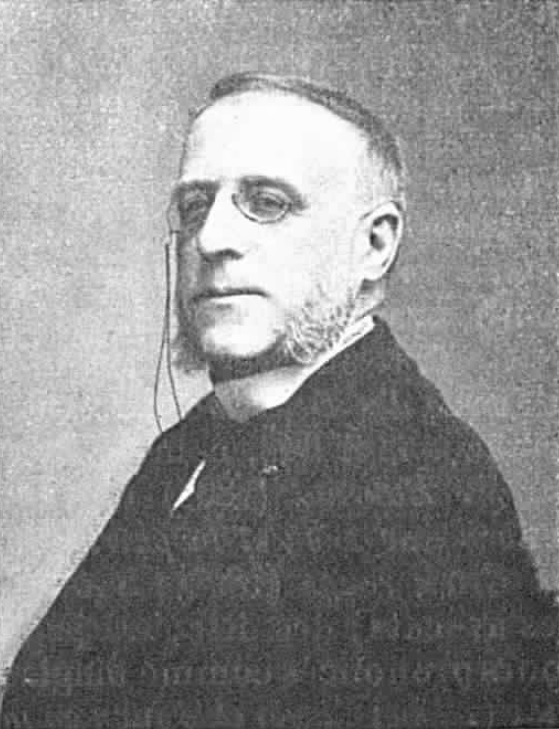 "Arthur Desjardins (1835-1901). Phot. Pierre Petit".